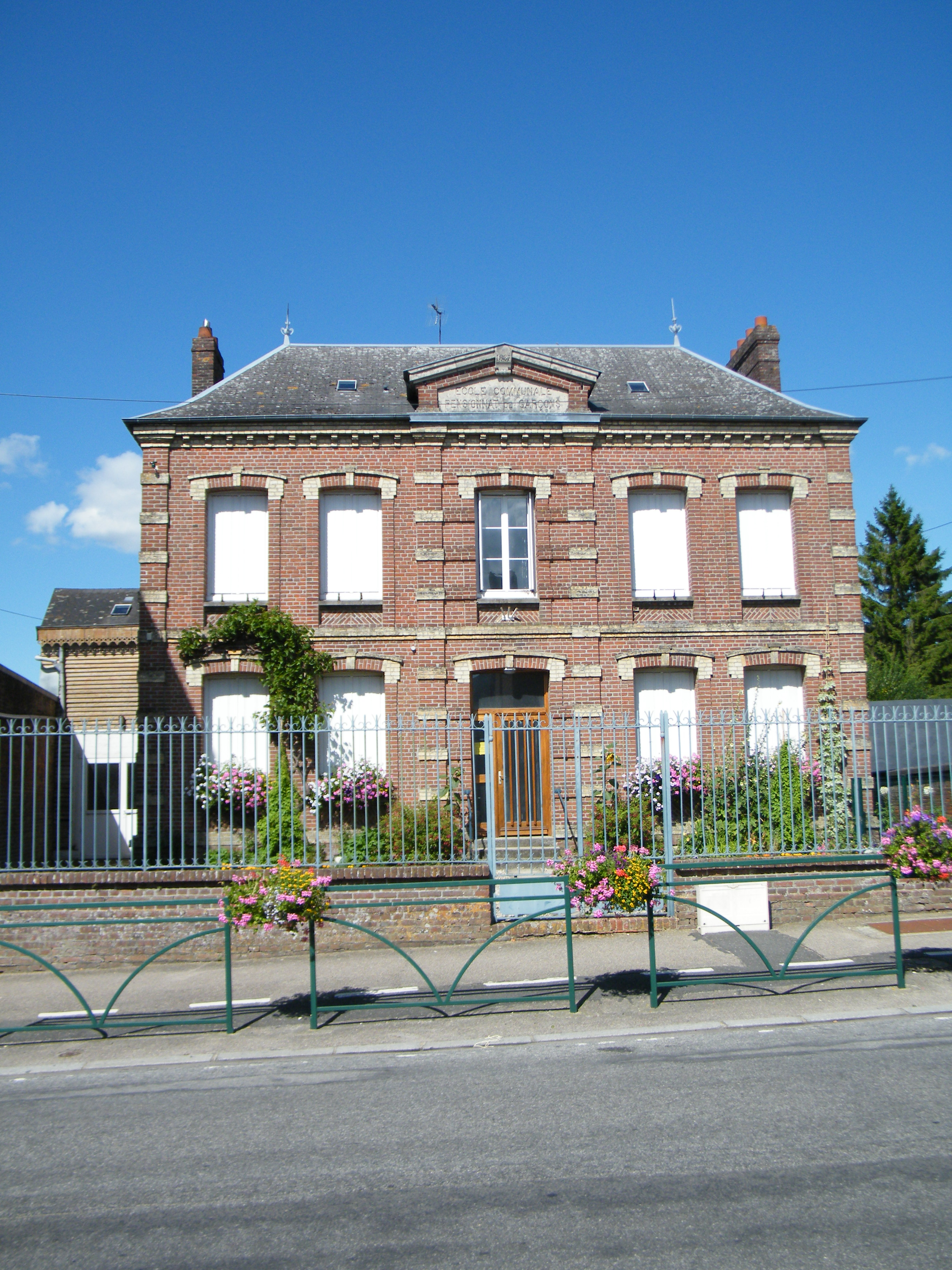 Foucarmont, Seine-Maritime, France, ancienne école de garçons (pensionnat).